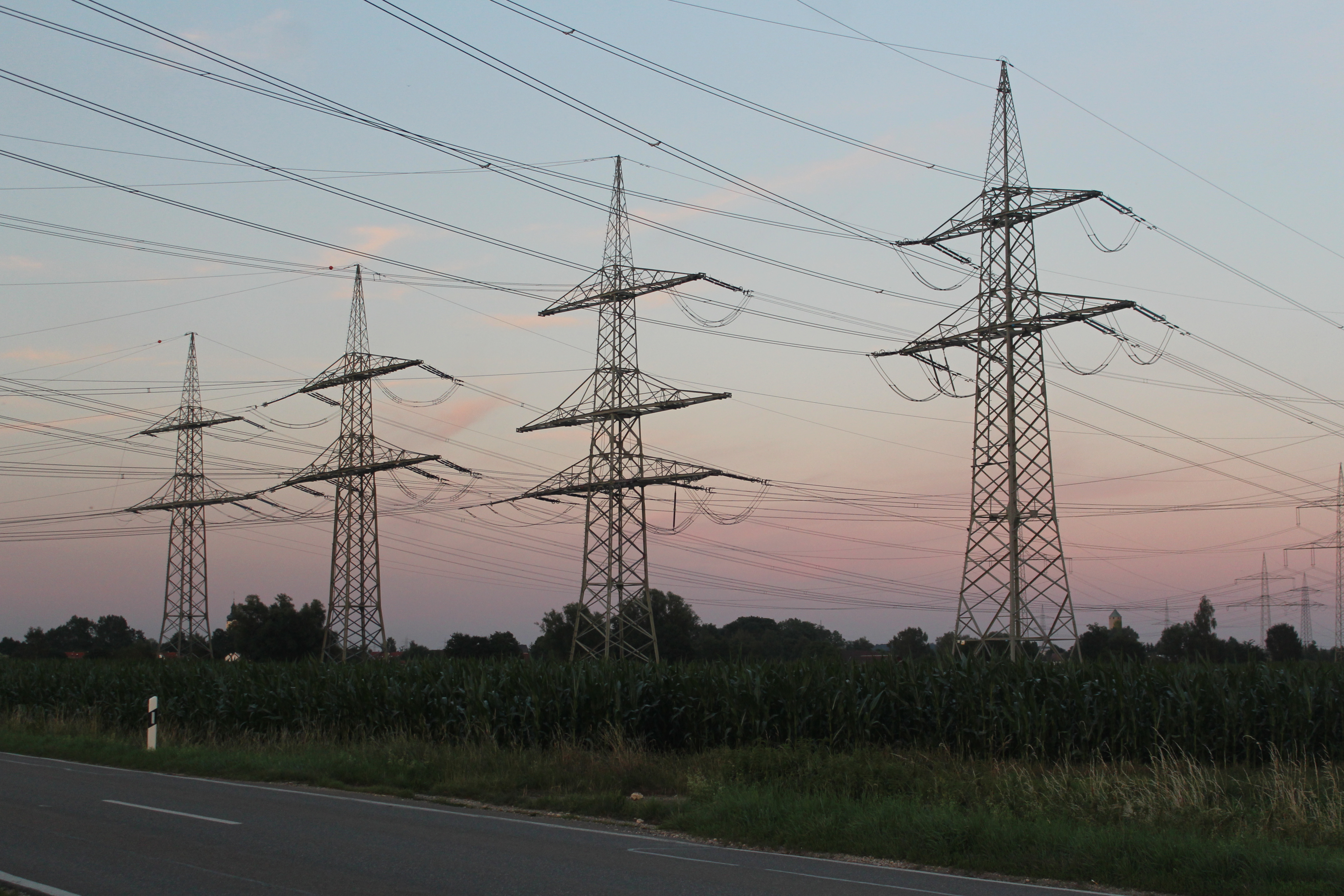 Freileitungsmaste beim Umspannwerk Dellmensingen